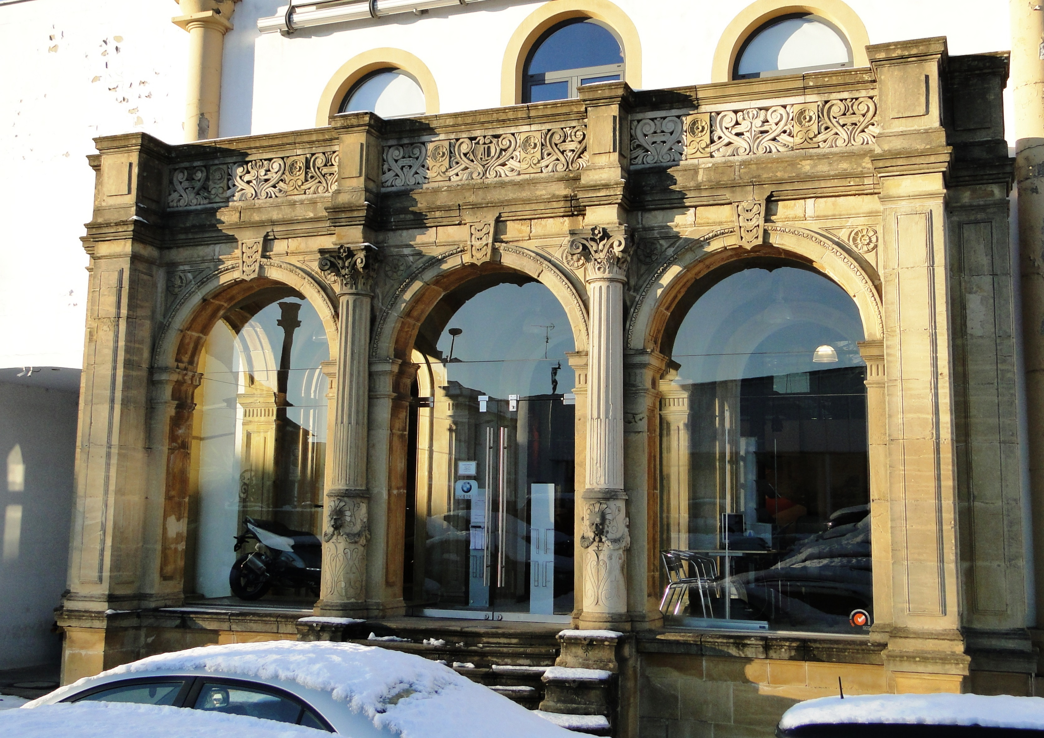 Portal mat de Saile vun der fréierer Villa Brincour déi 1969 um bd Royal (Lëtzebuerg) ofgerappt gouf. Et gouf 1973 als Bléckfank un engem Gebai an der rue de Neufchâteau (Bouneweg) neess opgeriicht.